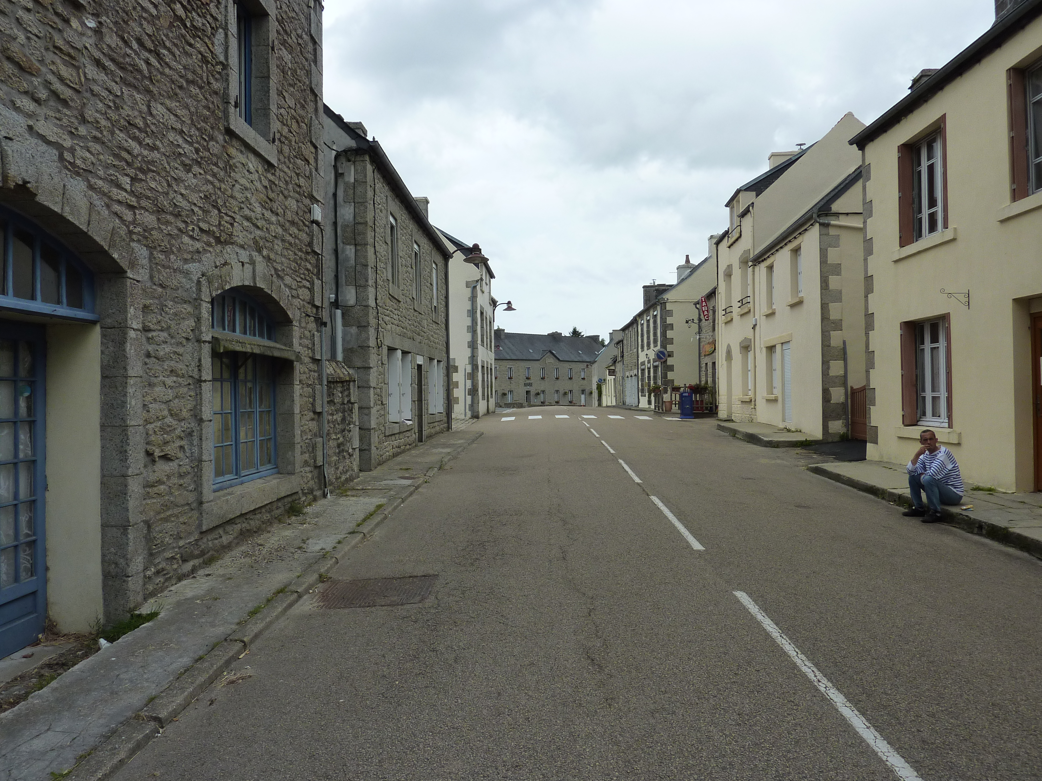 Berrien: la rue principale du village